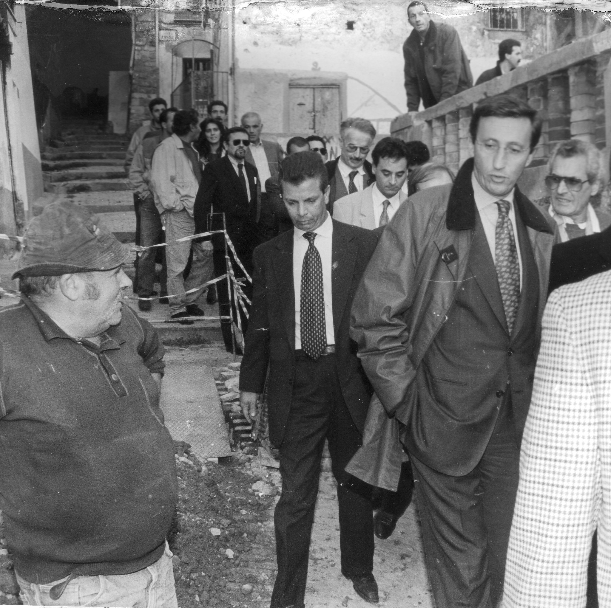 Gianfranco Fini a Sanremo Licensing Categoria:Immagini di Gianfranco Fini